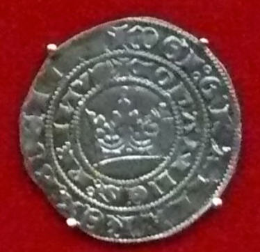 Pražský groš Jana Lucemburského